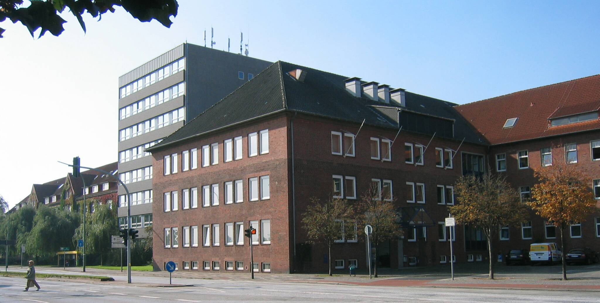 Lehe: Stadthaus, der Sitz der Stadtverwaltung Bremerhavens, Hinrich-Schmalfeldt-Straße, Ecke Stresemannstraße